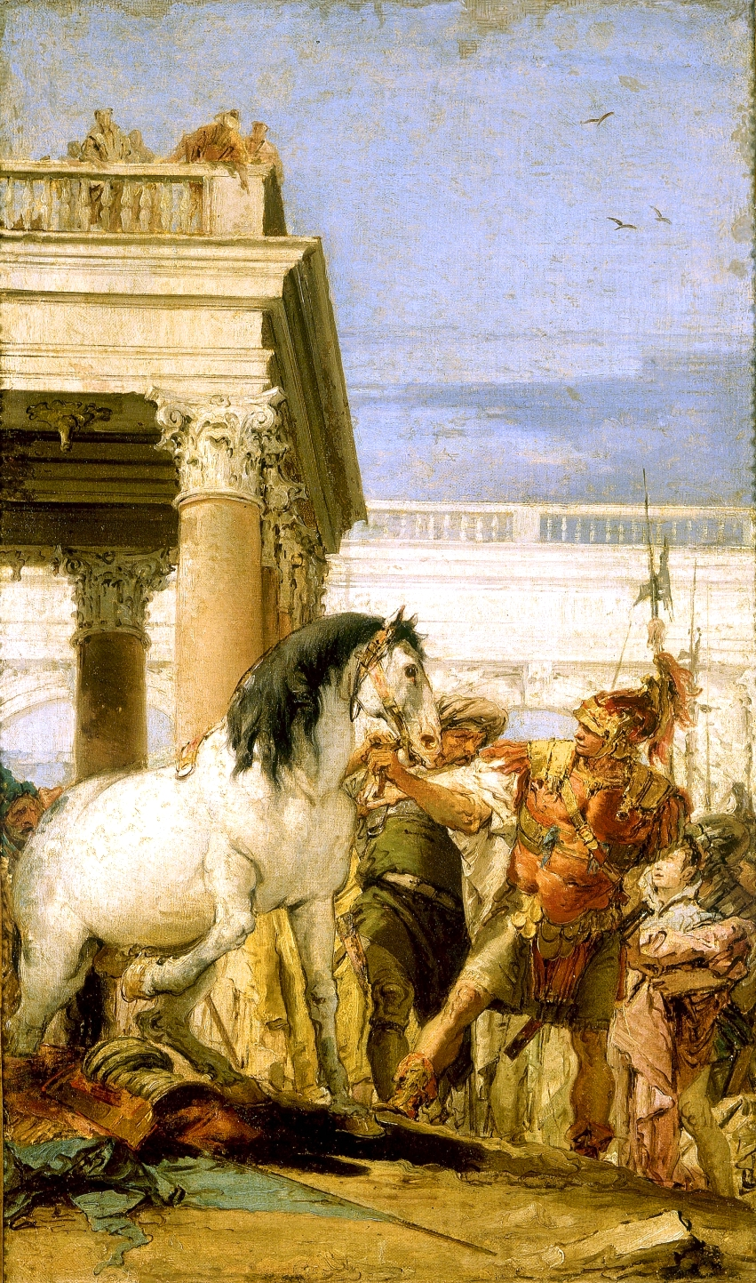 Giambattista Tiepolo, Alexandre et Bucéphale, huile sur toile, 58 x 34,7 cm, Paris, musée du Petit Palais.